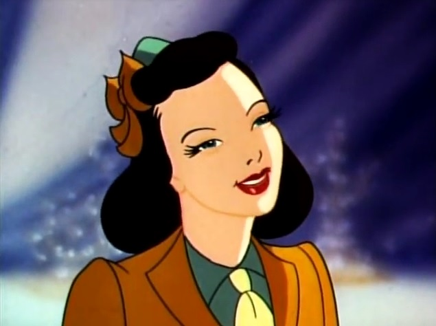 Imagen de la película Los monstruos mecánicos que muestra a una sonriente Lois Lane.